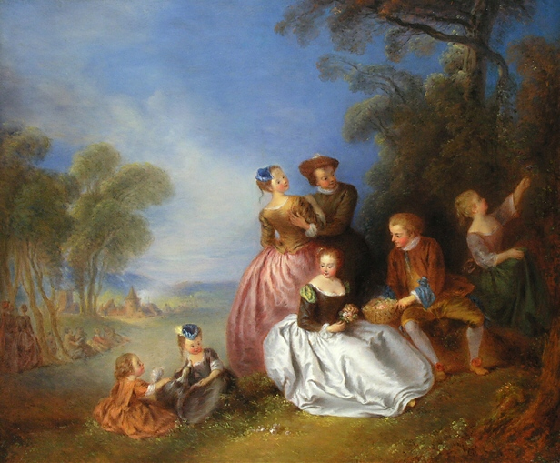 Familienausflug in der Campagne; Öl auf Leinwand; 46 x 45 cm